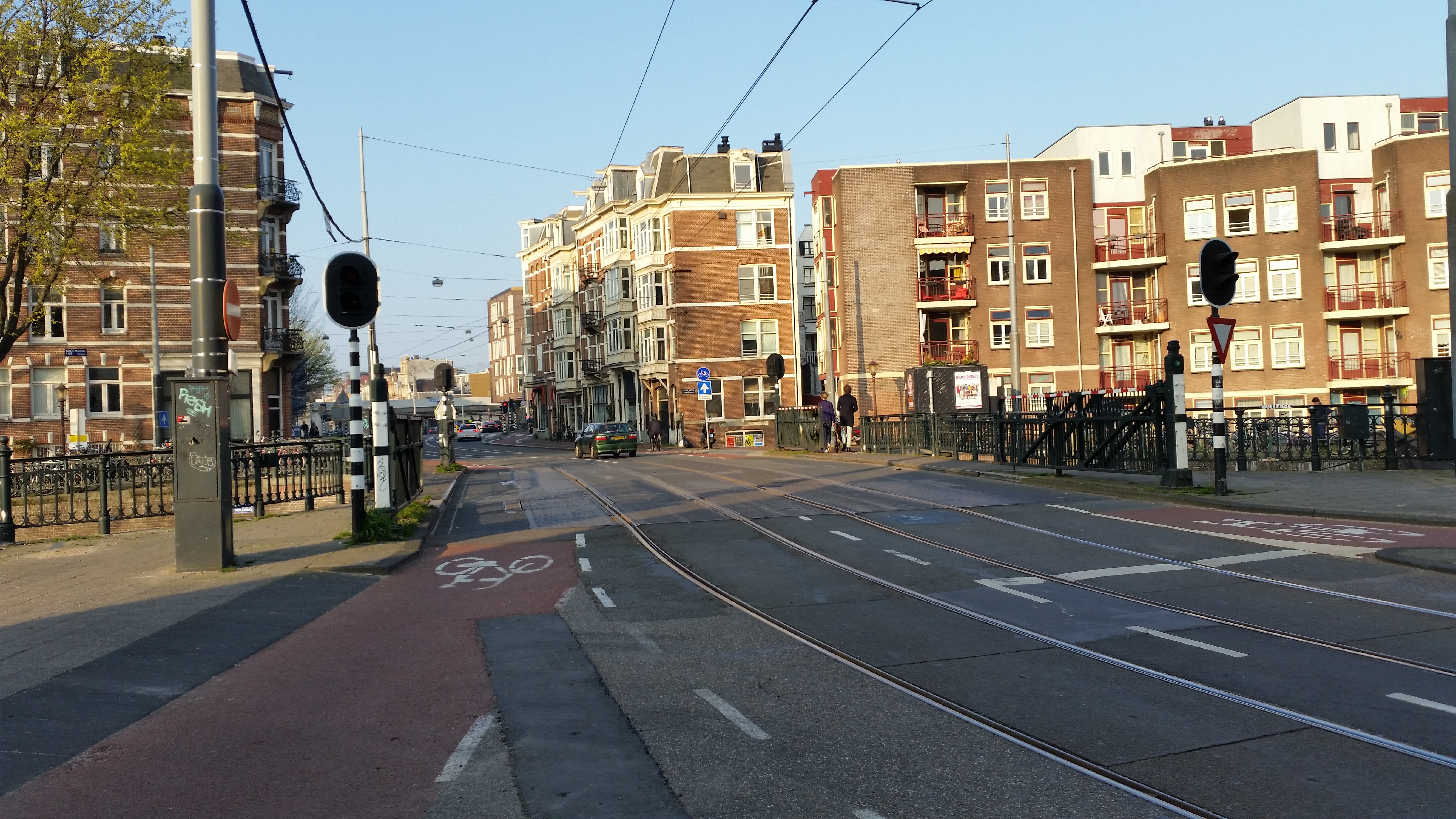 Overzicht over de Bullebak